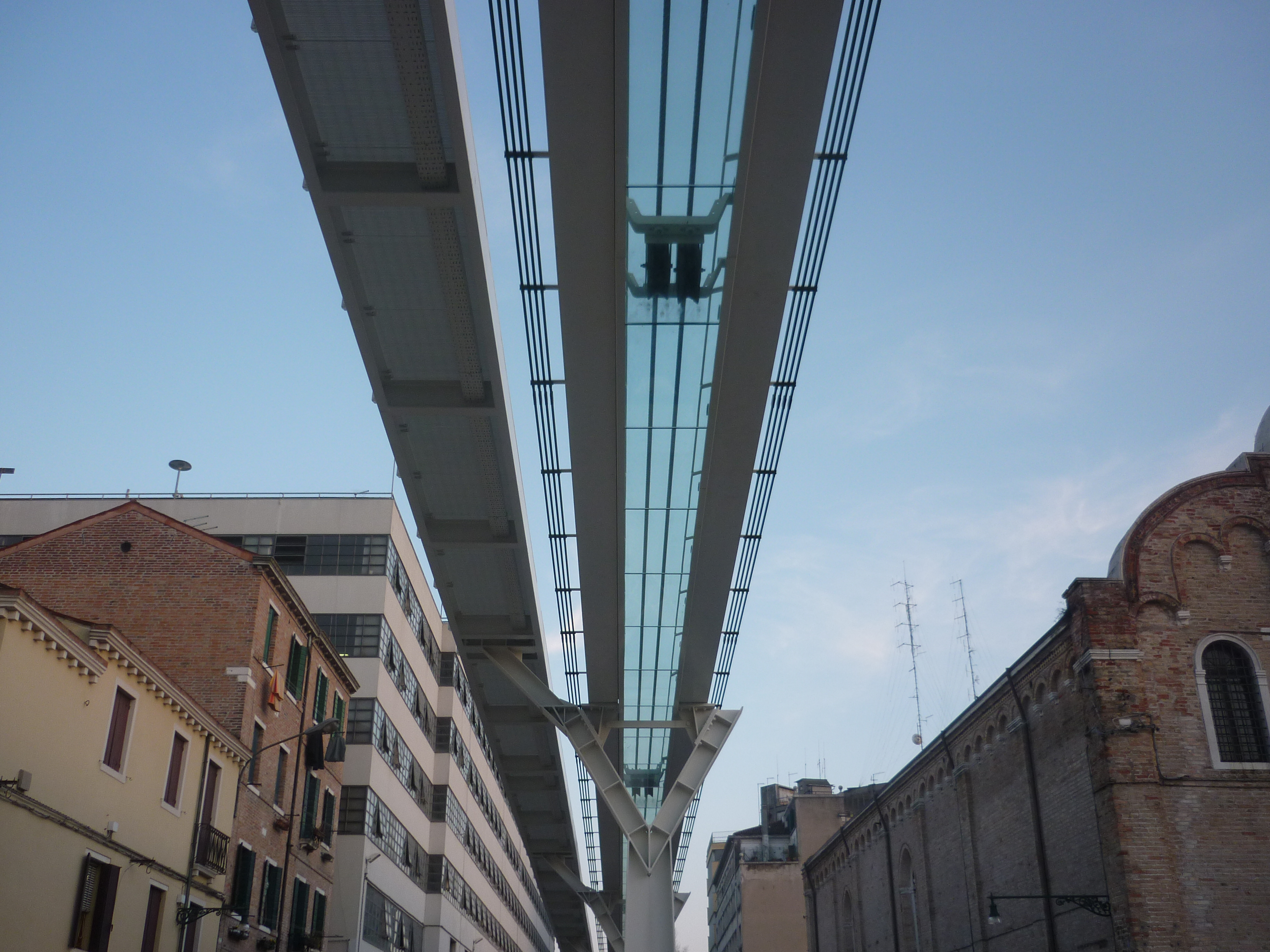 venice